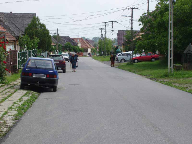 Károlyfalva szócikkhez a falu utcaképe.